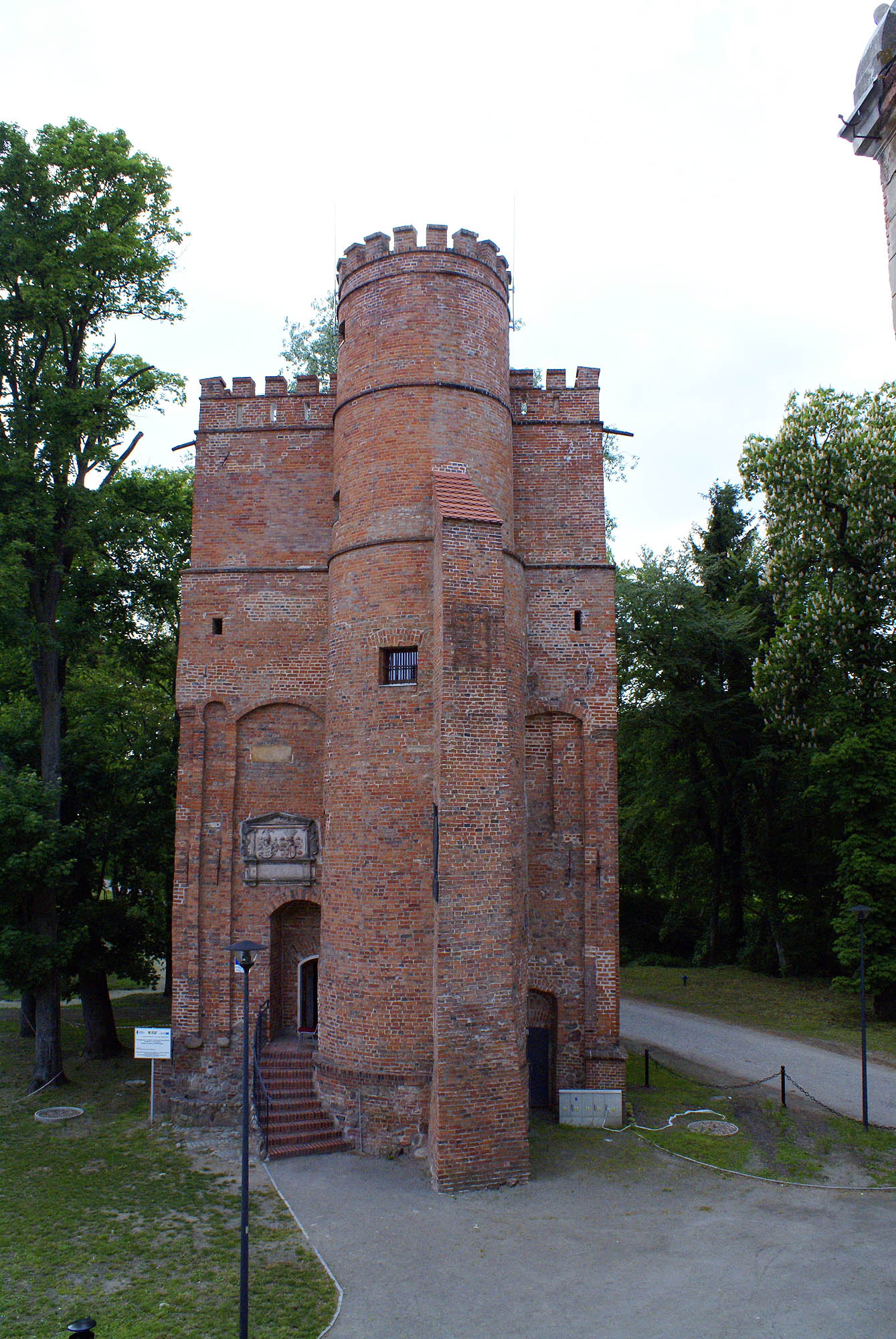 Żmigród, pałac Hatzfeldów (trwała ruina), XVIII, XIX